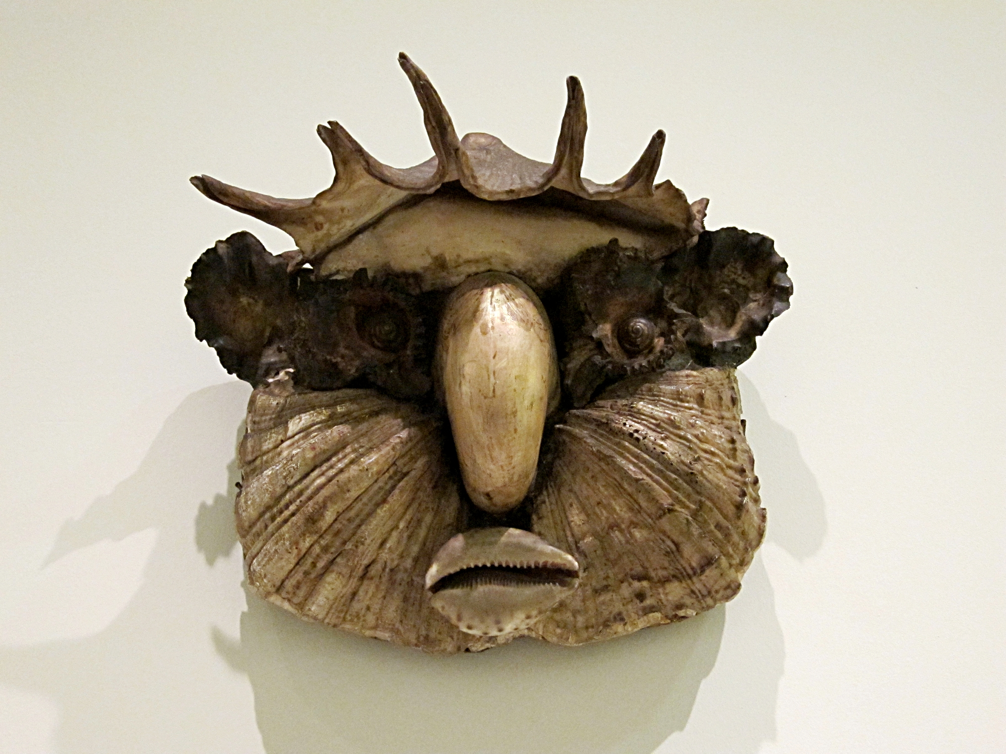 La reine Victoria de Pascal-Désir Maisonneuve au Lille Métropole Musée d'art moderne, d'art contemporain et d'art brut de Villeneuve d'Ascq.